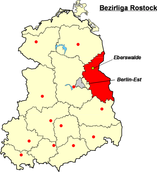 Localisation d'Eberswalde dans la Bezirksliga Francfort/Oder Catégorie:Logo de clubs de football - Allemagne